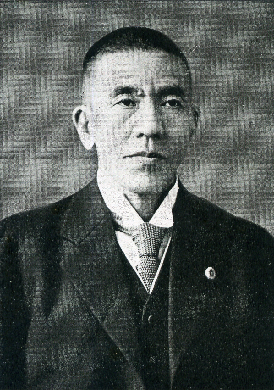 この写真は、青山憲三（1879-1953）の写真です。